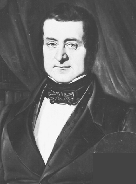 Hermann Josef Stupp, von 1851 bis 1863 Oberbürgermeister von Köln